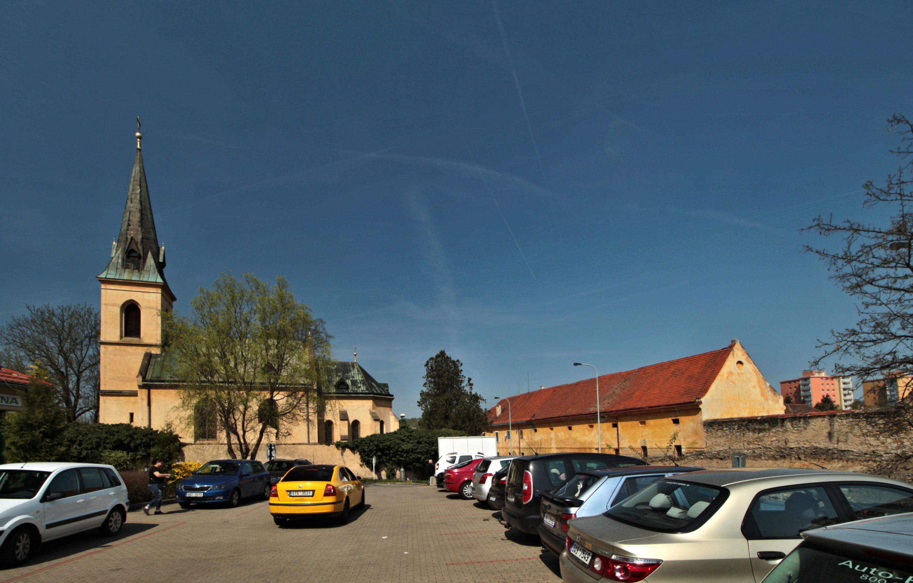 Hloubětín, kostel sv. Jiří